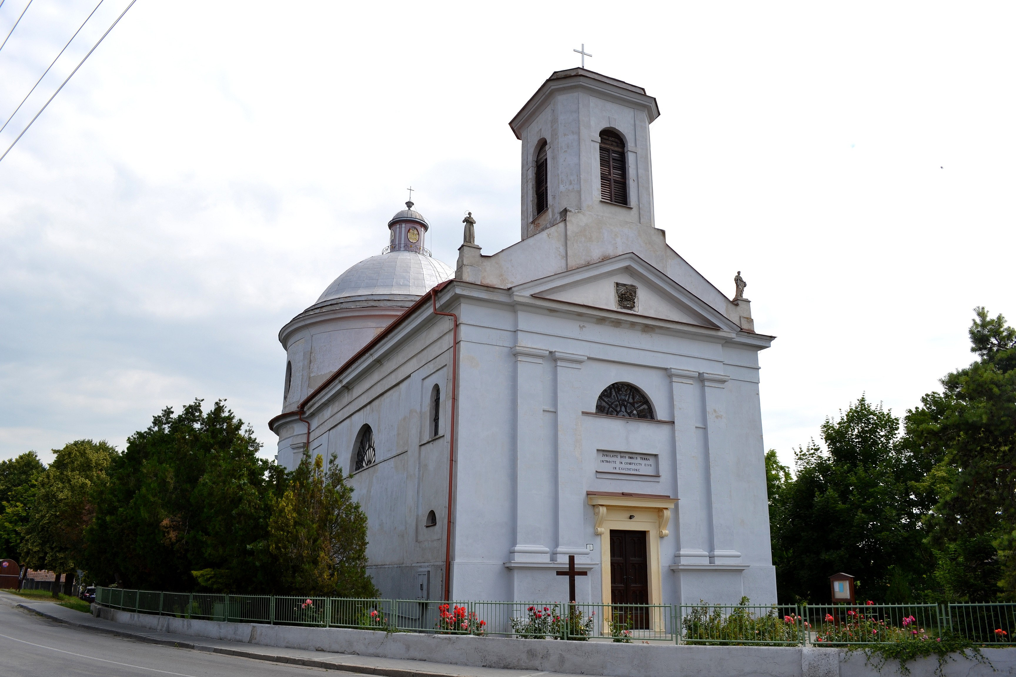 Čataj, Kostol svätej Margity Antiochijskej; celkový pohľad